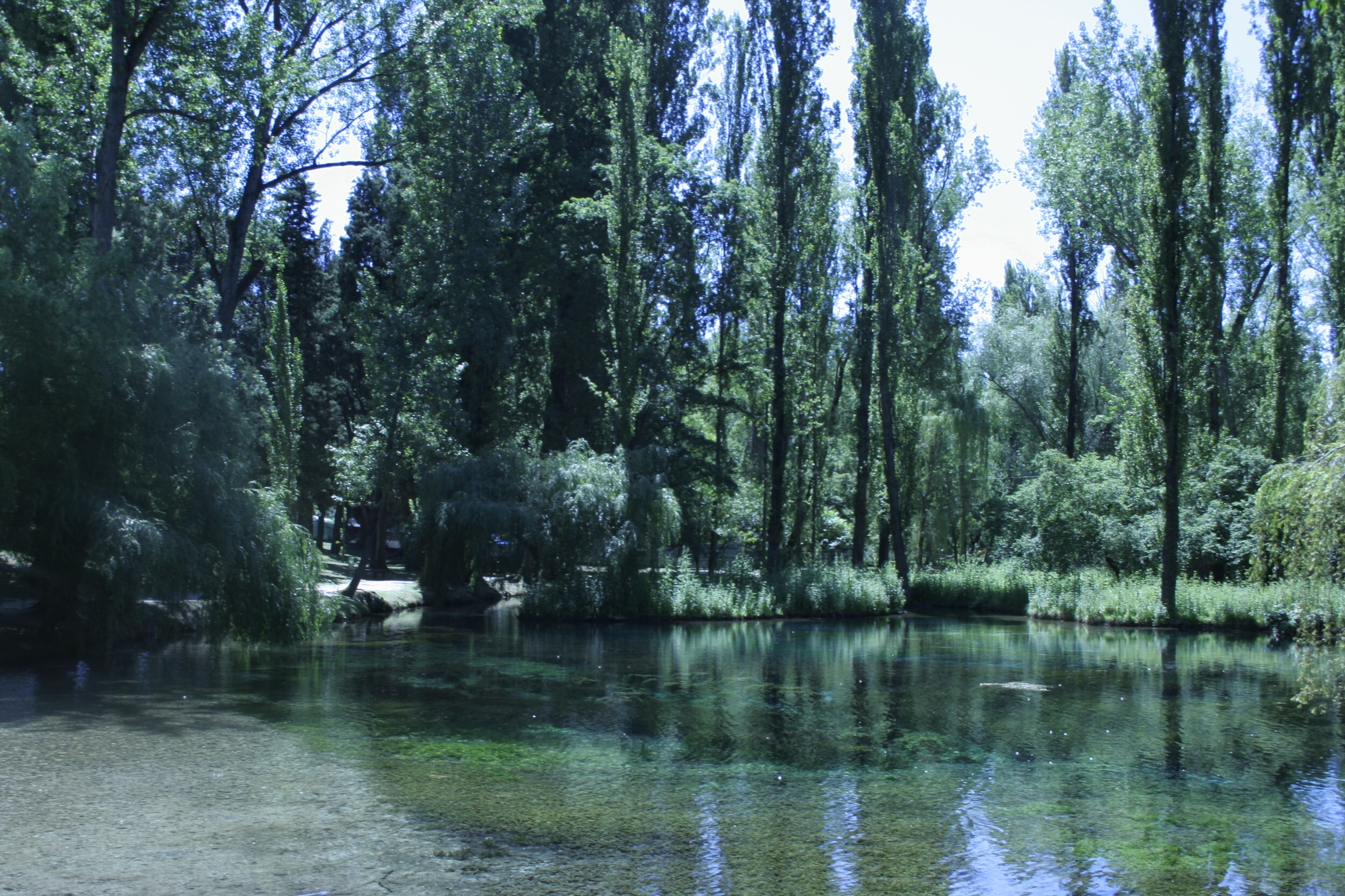 Fonti del Clitunno